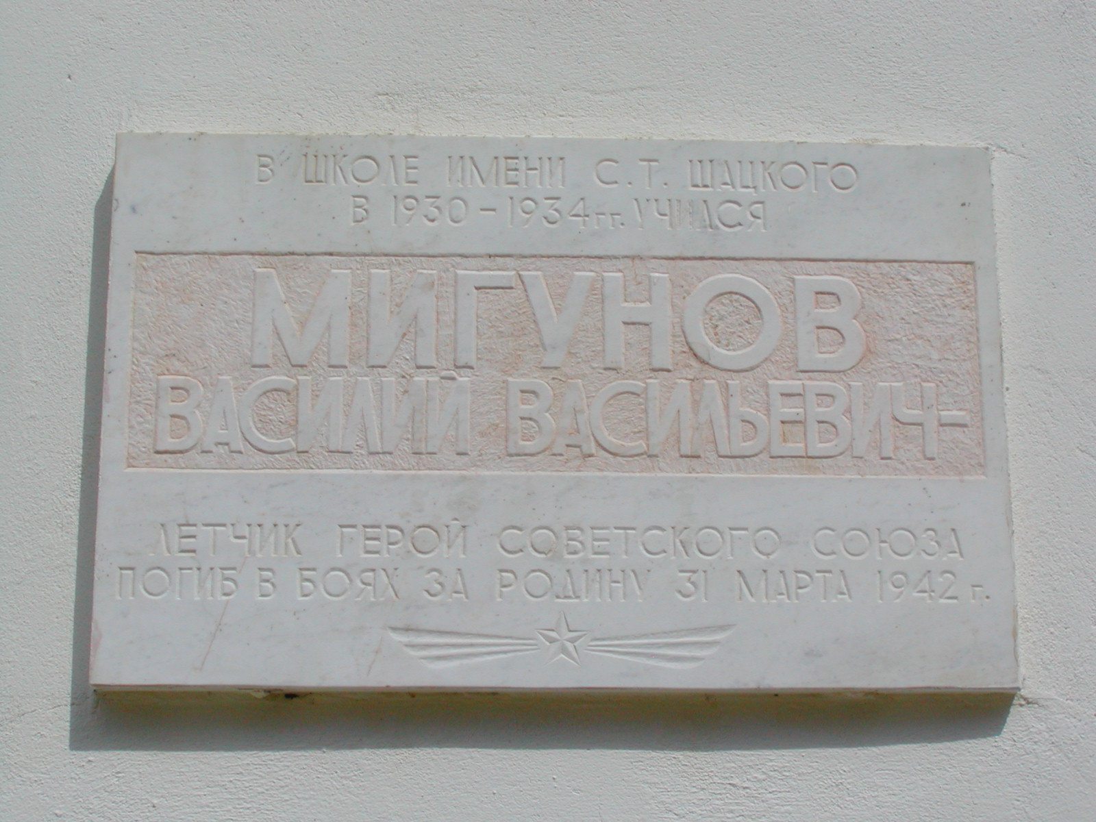 Памятная доска в честь Василия Васильевича Мигунова, установленная на школе № 1 города Обнинска.